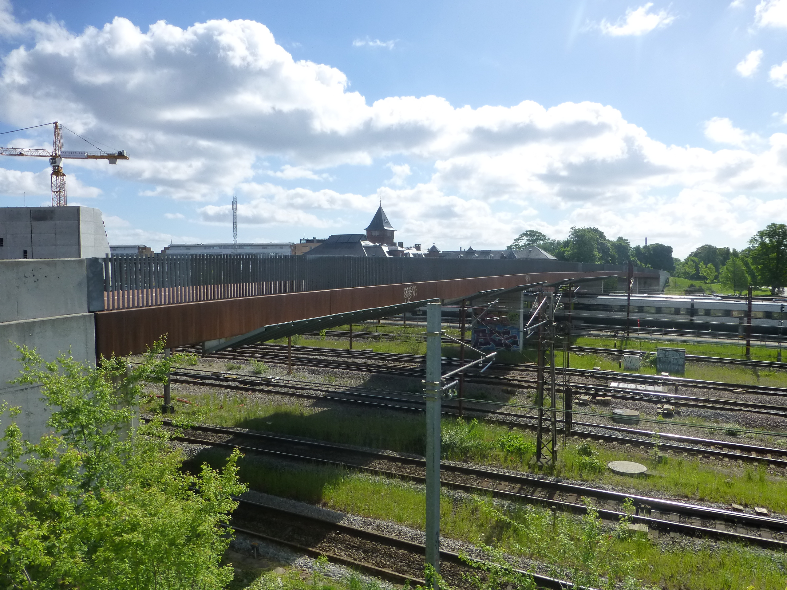 The bridge Langeliniebro in Østerbro in Copenhagen.